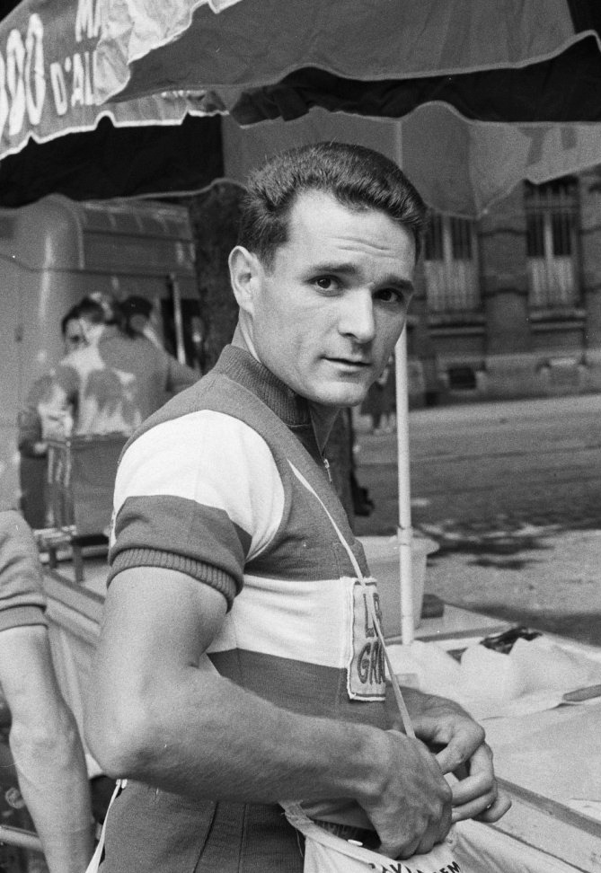 Tour de France , voor de start. Henry Anglade voor de start.